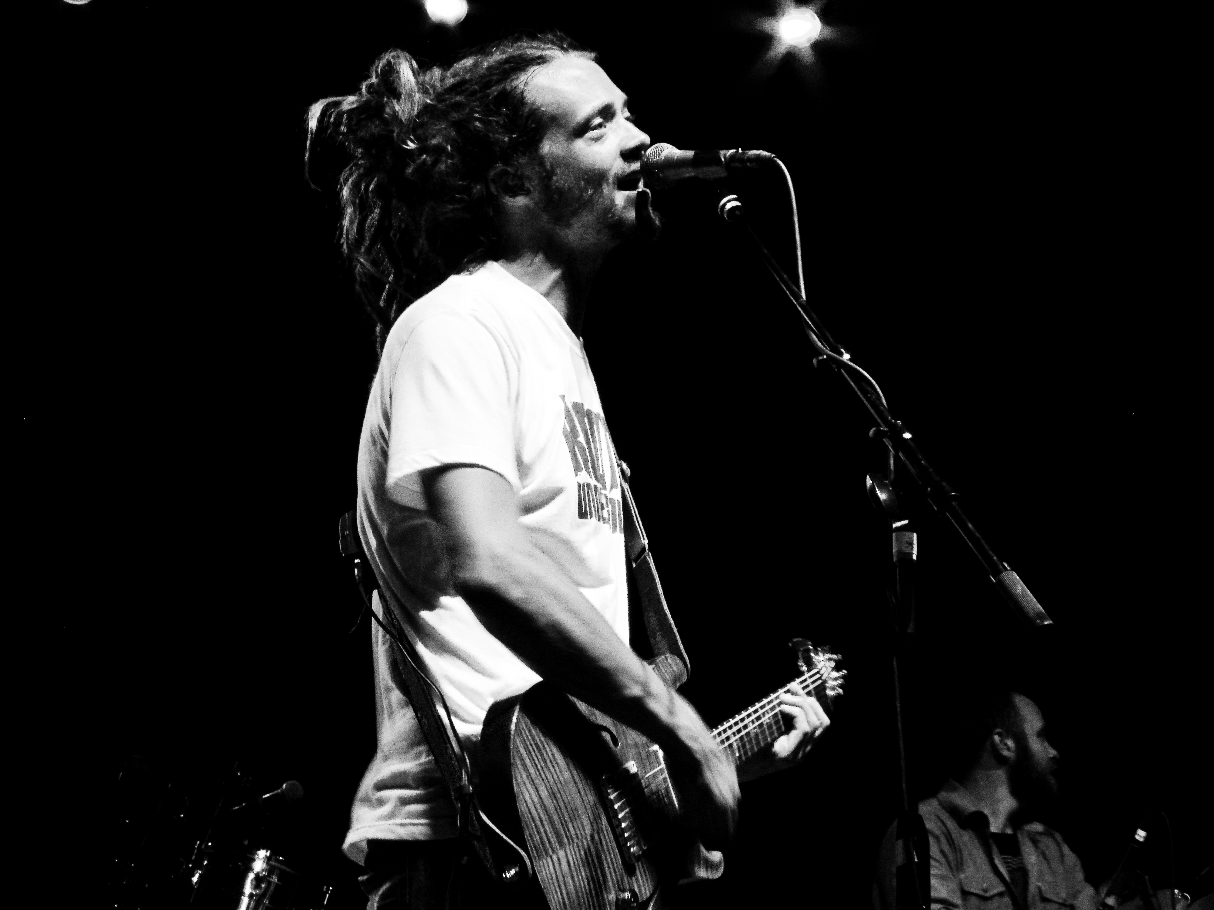 SOJA live at Merriweather Post Pavilion, August 13, 2011. Jacob Hemphill on the photo.